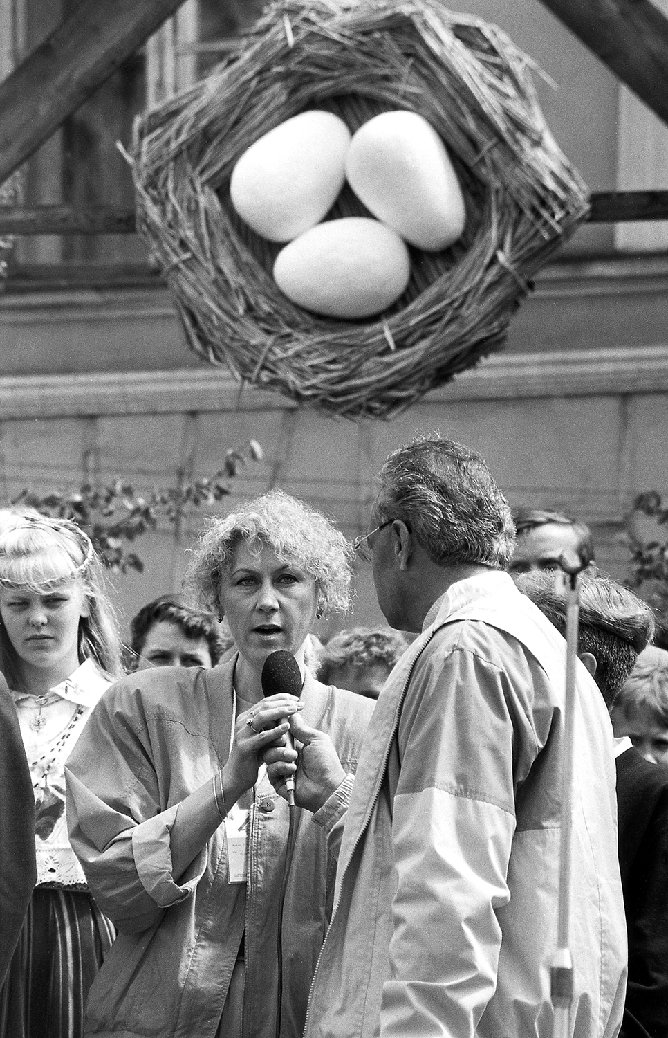 Heidy Tamme eesti laulja ja muusikapedagoog 89